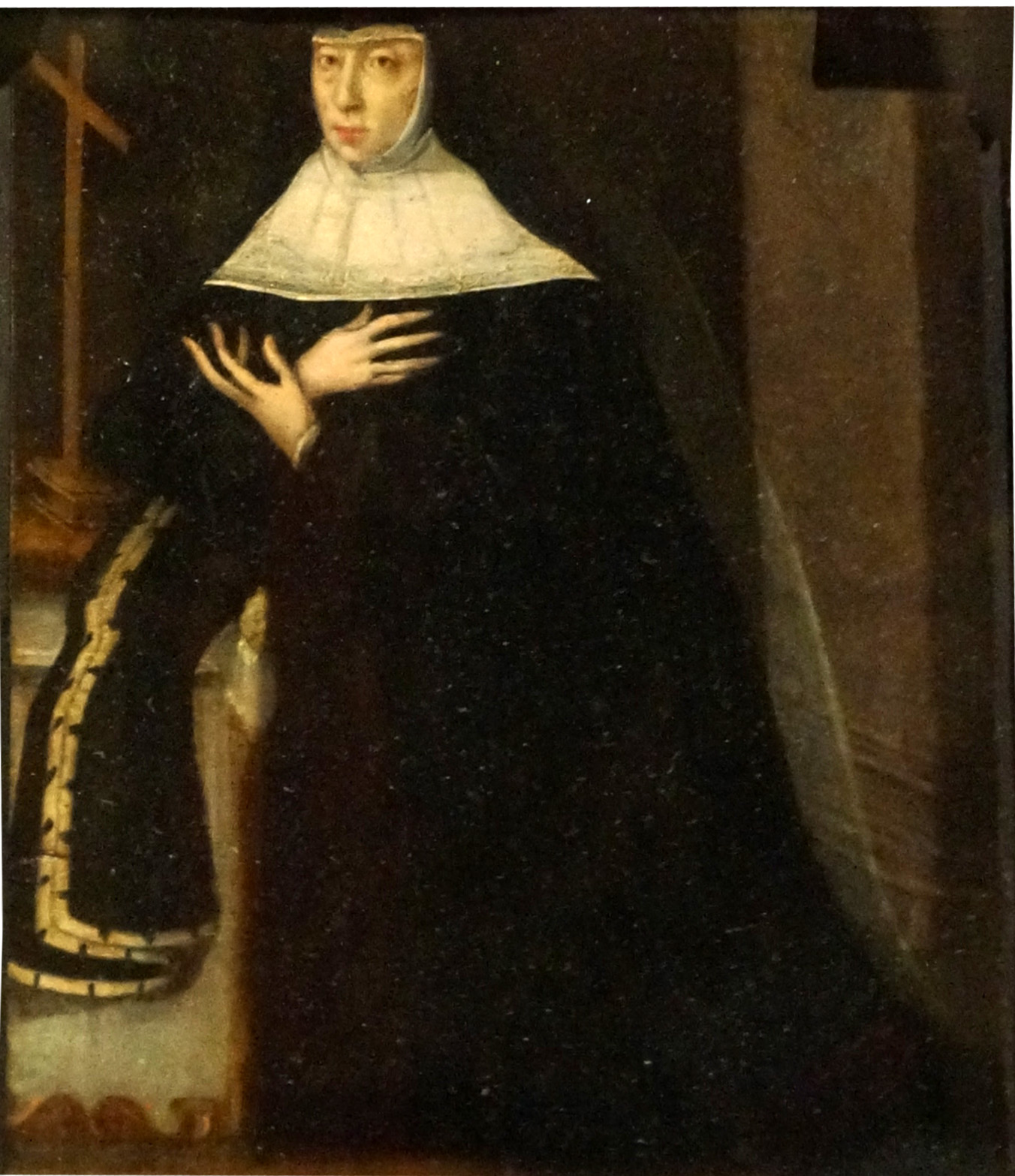 Présenté au Musée Lorrain. Huile sur cuivre, dépot du muusée des Beaux arts de Nancy.